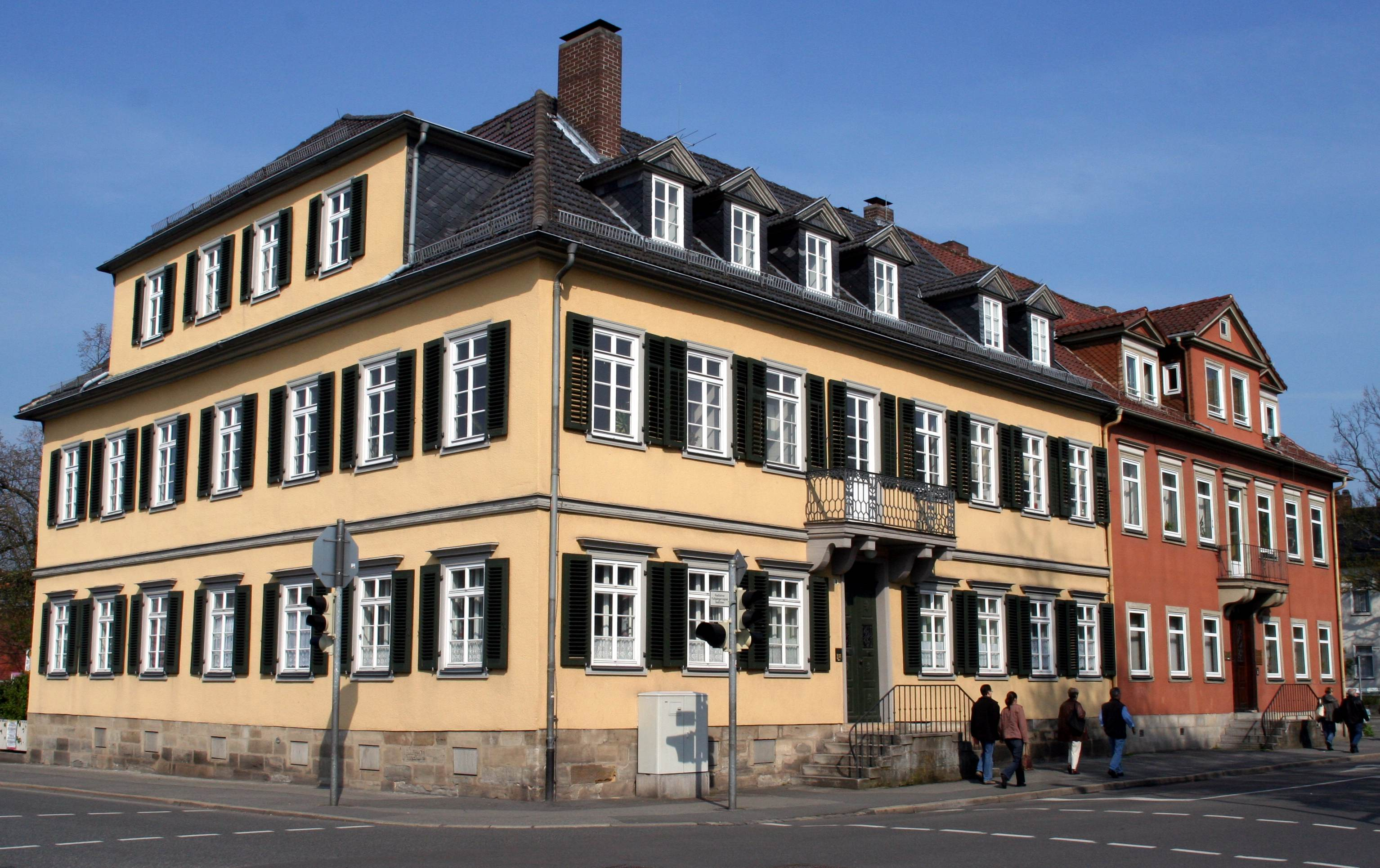 Ketschendorferstraße 8 in Coburg